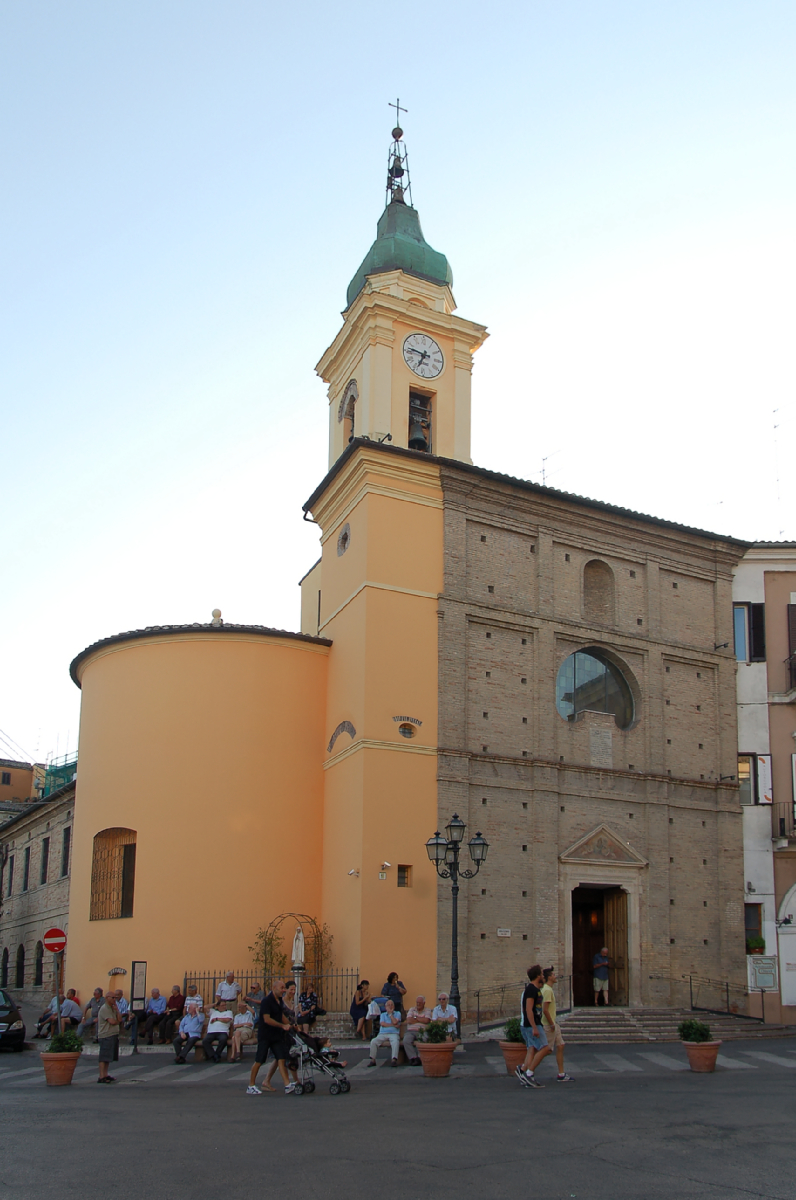 Chieti City 2011